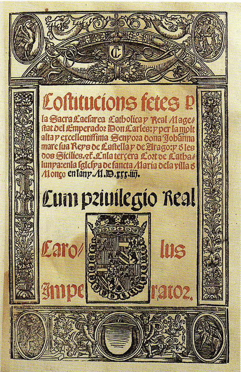 Constitucions, capítols i actes de Cort de les Corts de Barcelona de 1533 presidides per Carles V del Sacre Imperi Romanogermànic (Carles I d'Espanya).